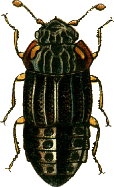 This file has been extracted from another file: Jacobs15.jpg